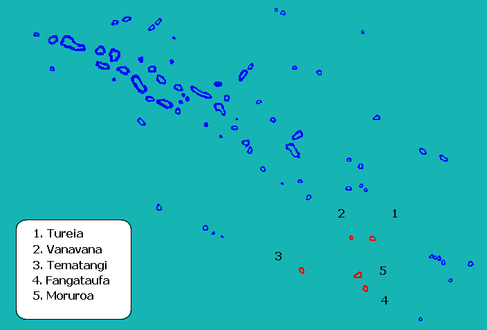 Mapa de localització de la comuna de Tureia a l'arxipèlag Tuamotu, Polinèsia Francesa.